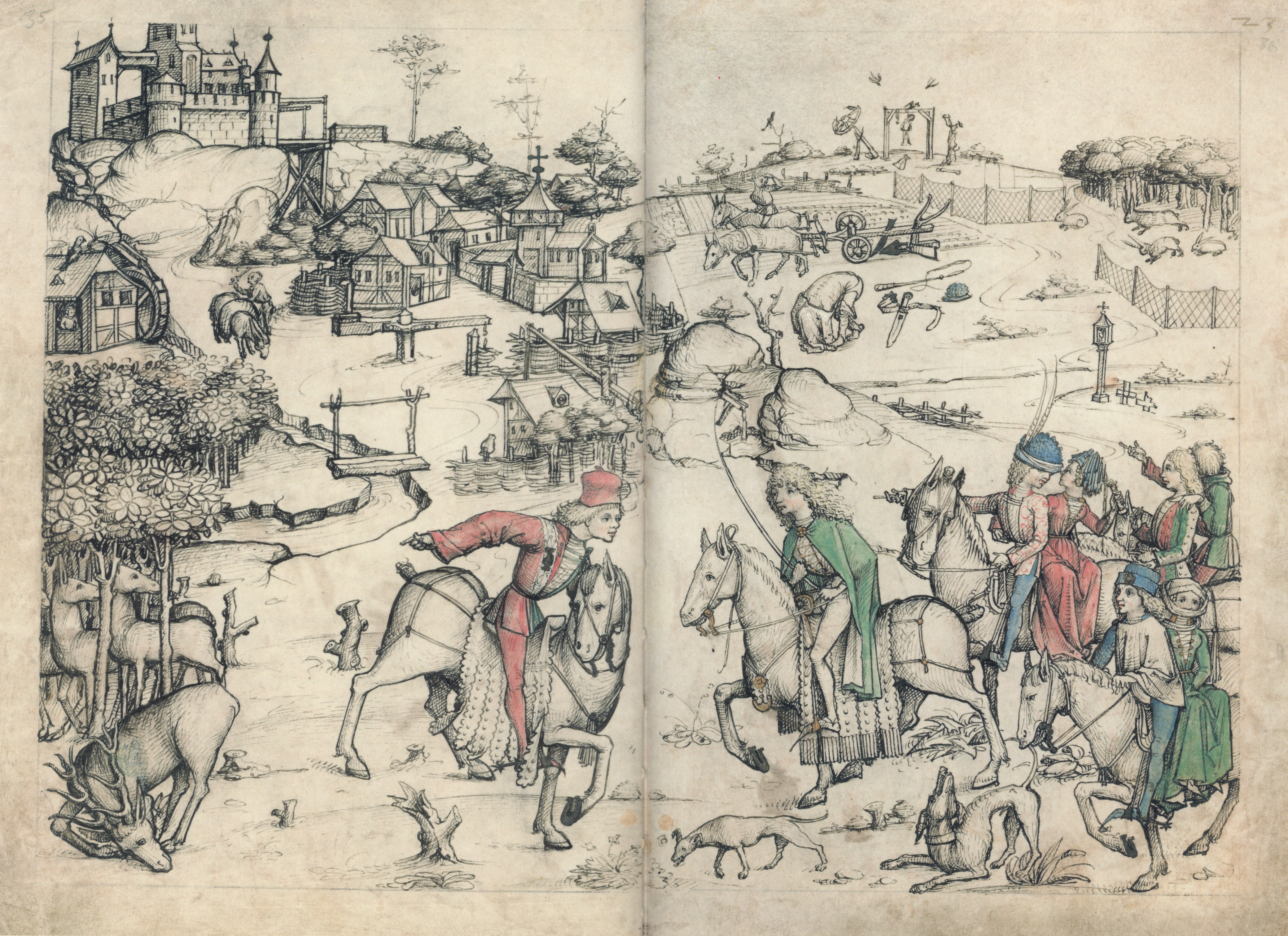 Mittelalterliches Hausbuch von Schloss Wolfegg Doppelseite fol. 22v–23r (Die Hochwildjagd)